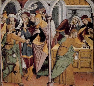 Affresco della Chiesa di Nostra Signora di Fontan, Briga